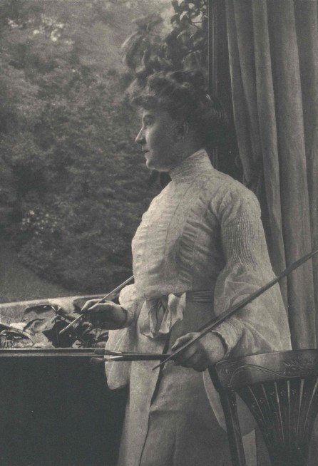 Ginzkey, Hermine - autoportrét